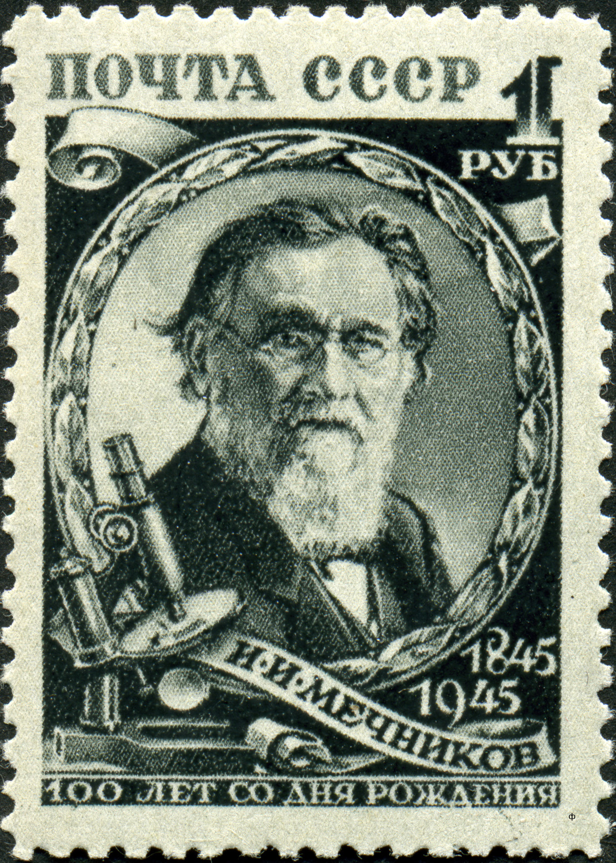 Марка СССР